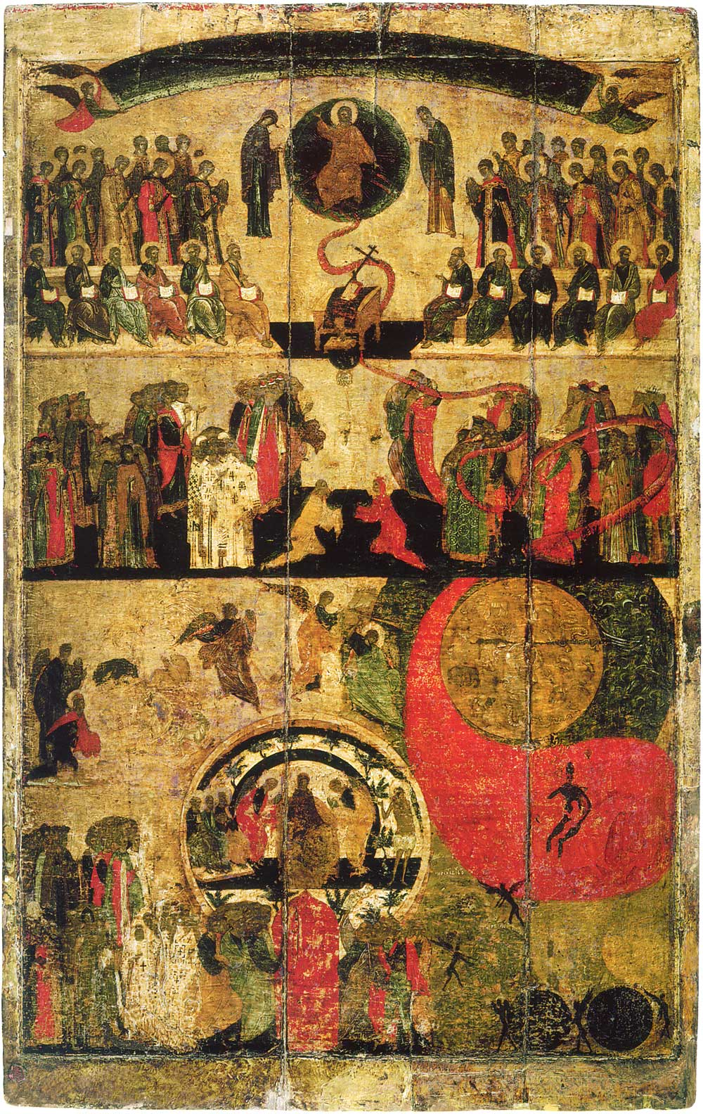 Страшный суд // Успенский cобор Московского Кремля, Москва, Россия Инв. 3225 соб.; Ж-277